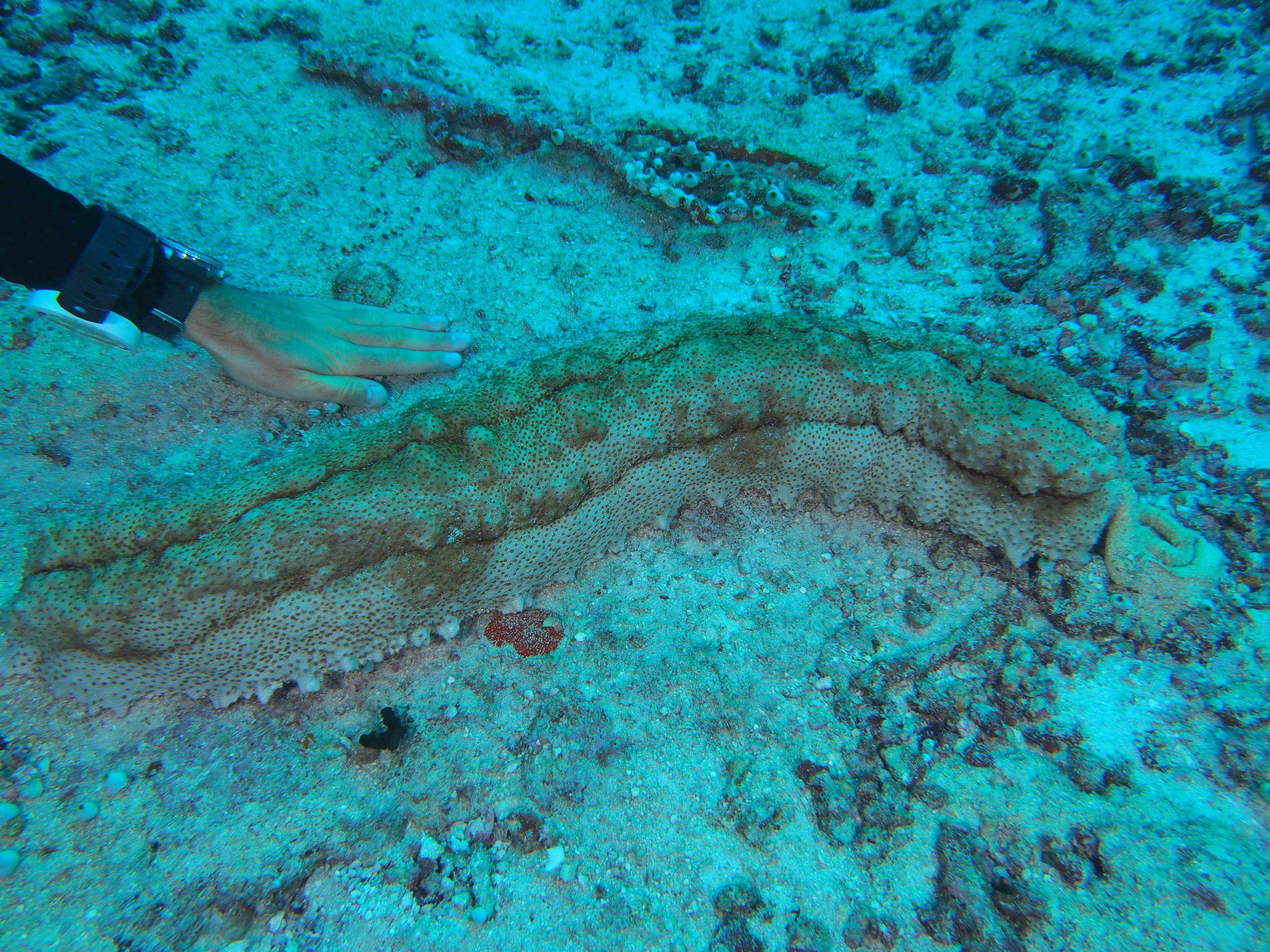 Une énorme holothurie géante (Thelenota anax) aux Maldives (atoll de Baa).